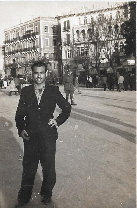 בביקור בעיר טריפולי לבדיקת הנמל והחופים.